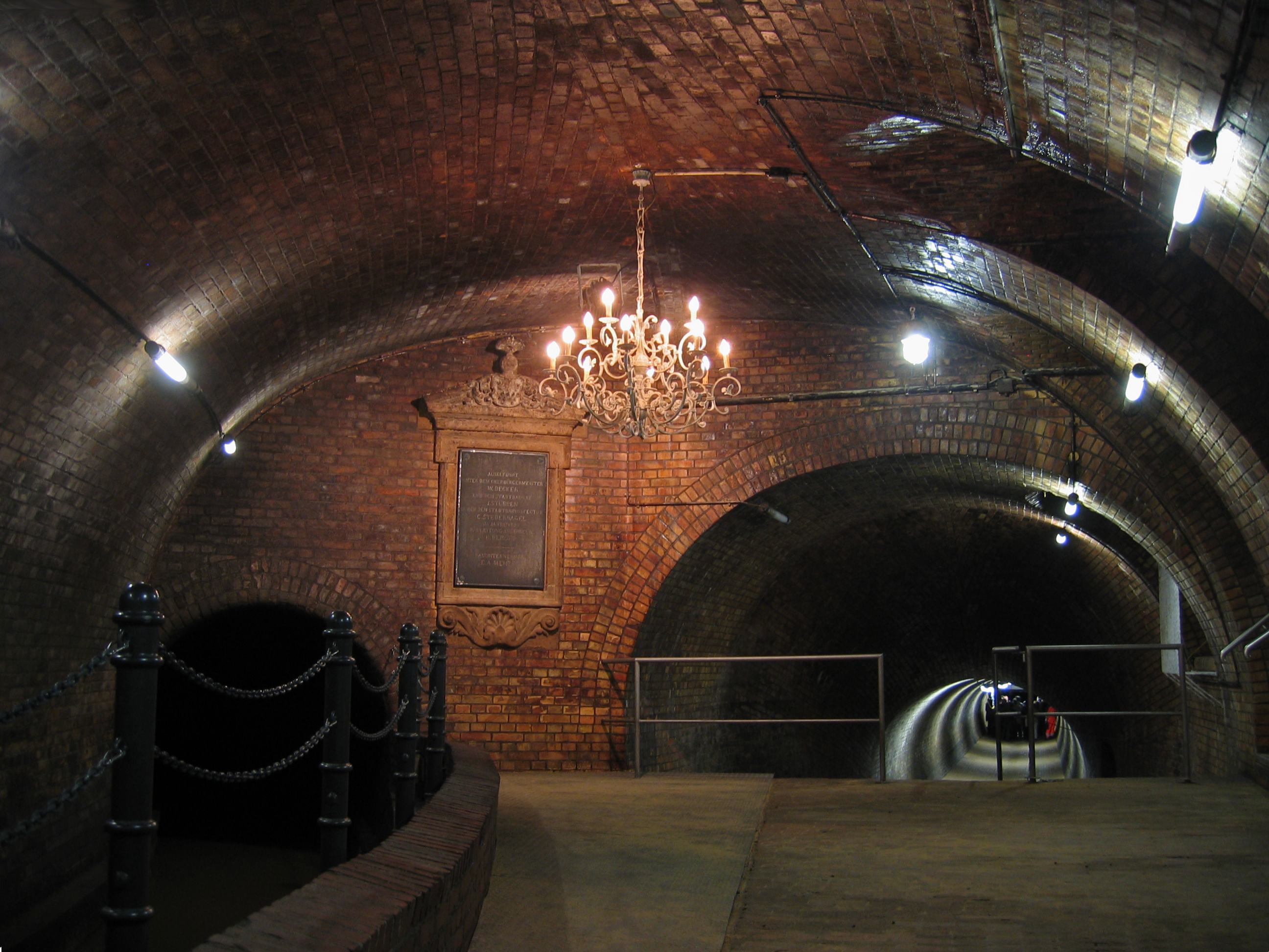 Der denkmalgeschützte Kronleuchtersaal in der Kölner Kanalisation